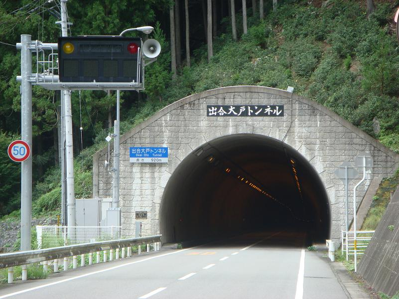 国道195号出合大戸トンネル（徳島県那賀郡那賀町）